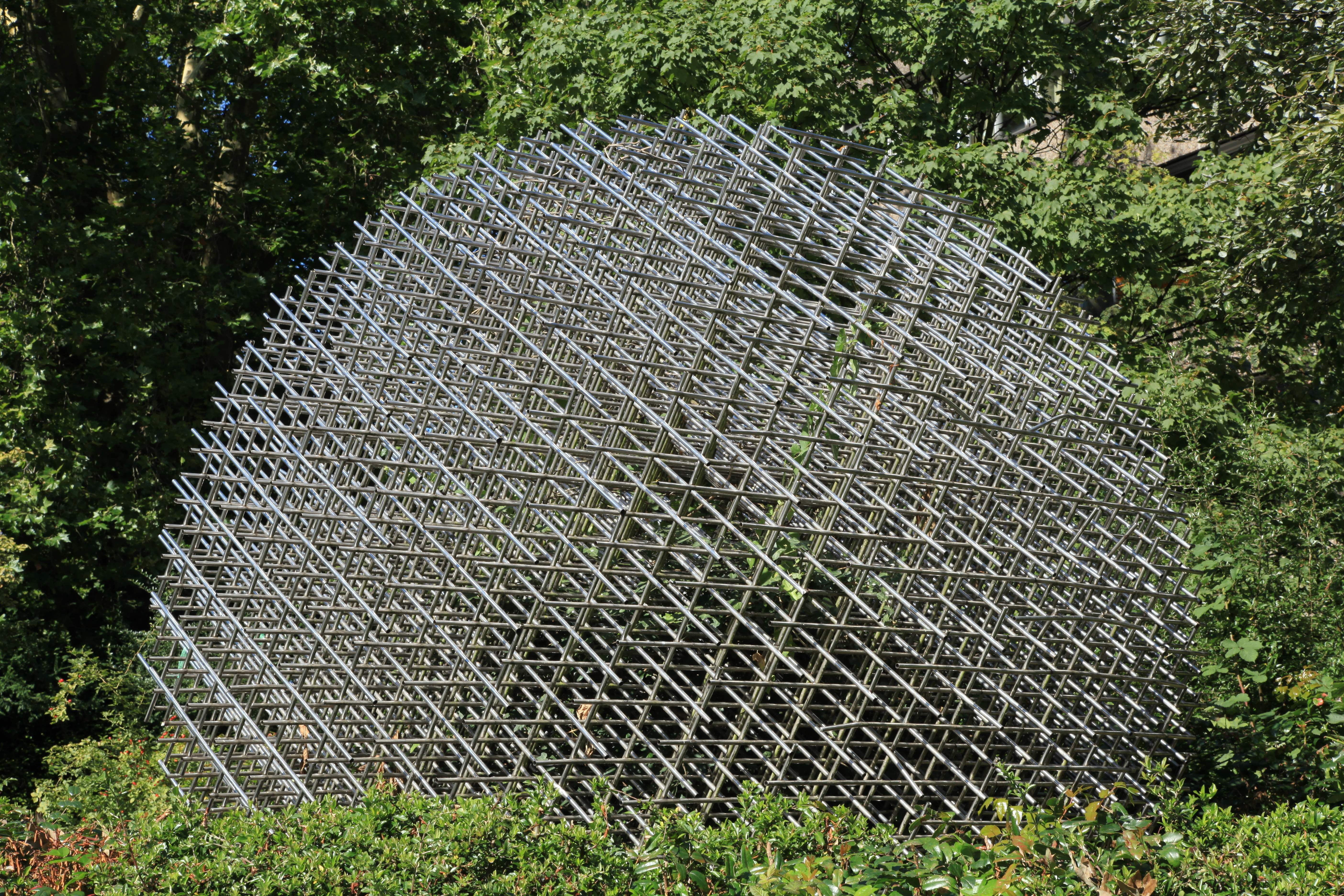 Sphere trames, Kleiner Werth in Wuppertal